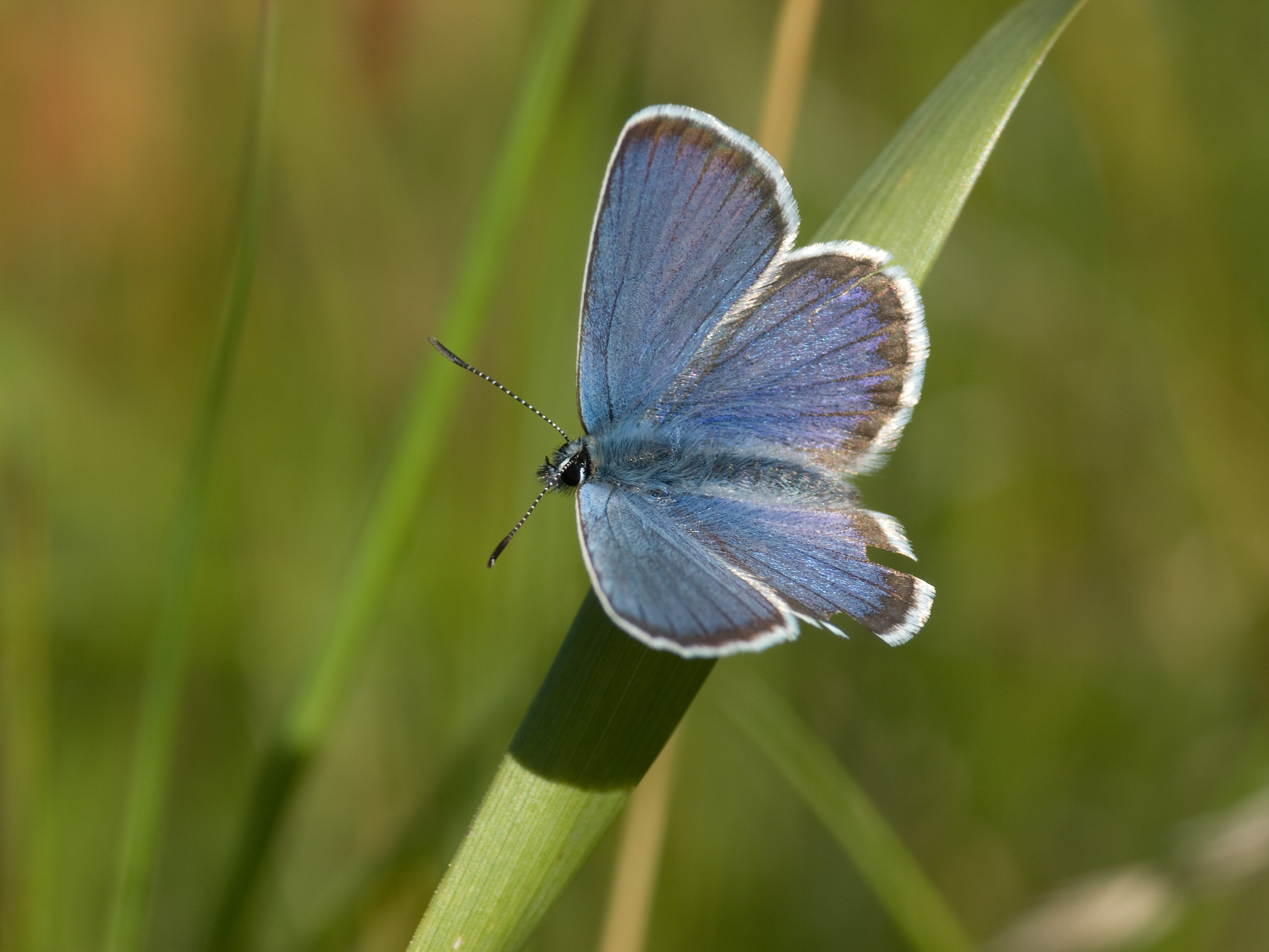 Idas-Bläuling, Plebejus idas, picture taken in Munich/Germany